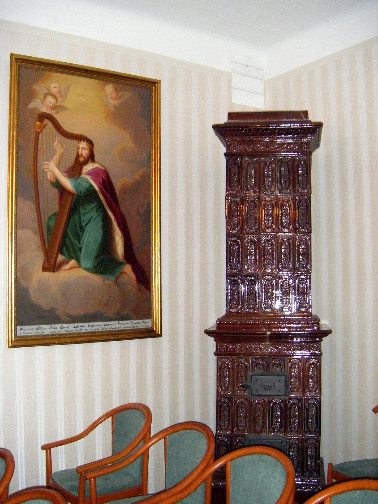 Pázmáneum